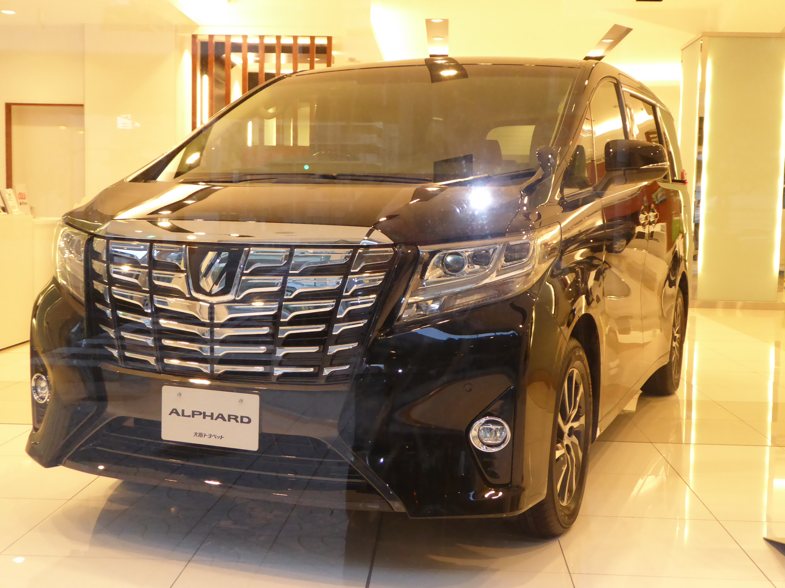 H30W型トヨタ・アルファードGFをフロントから撮影。